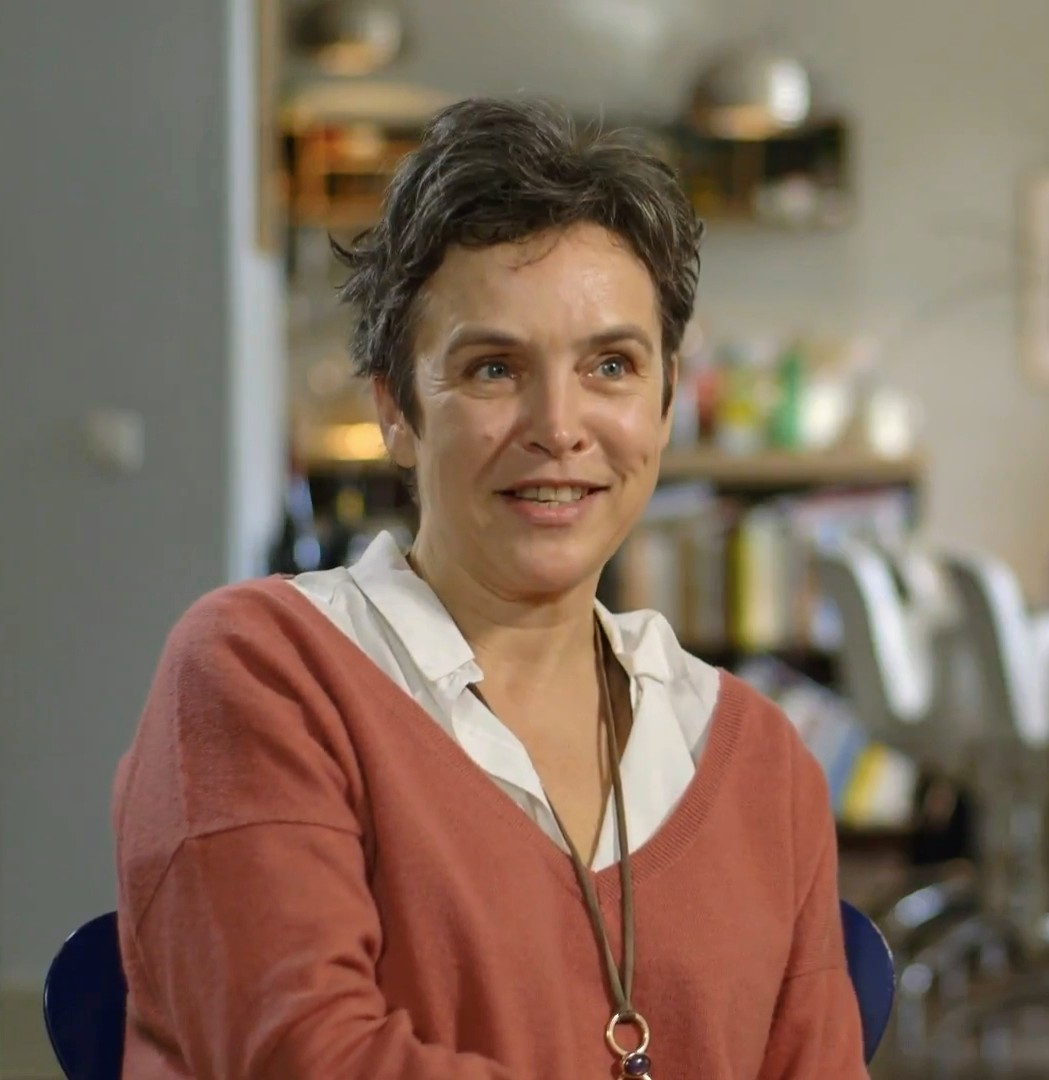 Auch für gemeinnützige Organisationen und Sozialunternehmen ist die Digitalisierung eine große Herausforderung. Joana Breidenbach, Mitgründerin der Spendenplattform , erklärt, wie sich Schwarmintelligenz für die gute Sache einsetzen lässt. Aber kommen bei Big Data nicht die Bürgerrechte unter die Räder? Weitere Videos zum Thema: Miriam Wohlfarth: Fintech, Banken und Disruption Viktor Mayer-Schönberger: Big Data - neue Sicht auf die Welt Friederike Welter: Mittelstand und Disruption Autor: Timur Diehn Produktion: Webclip Medien Berlin Der Stifterverband, die Leopoldina und die EFI veranstalten zum digitalen Wandel in Wirtschaft und Gesellschaft den Forschungsgipfel am 28. März 2017 in Berlin zum Thema: Aufbau einer neuen Innovations- und Wagniskultur.